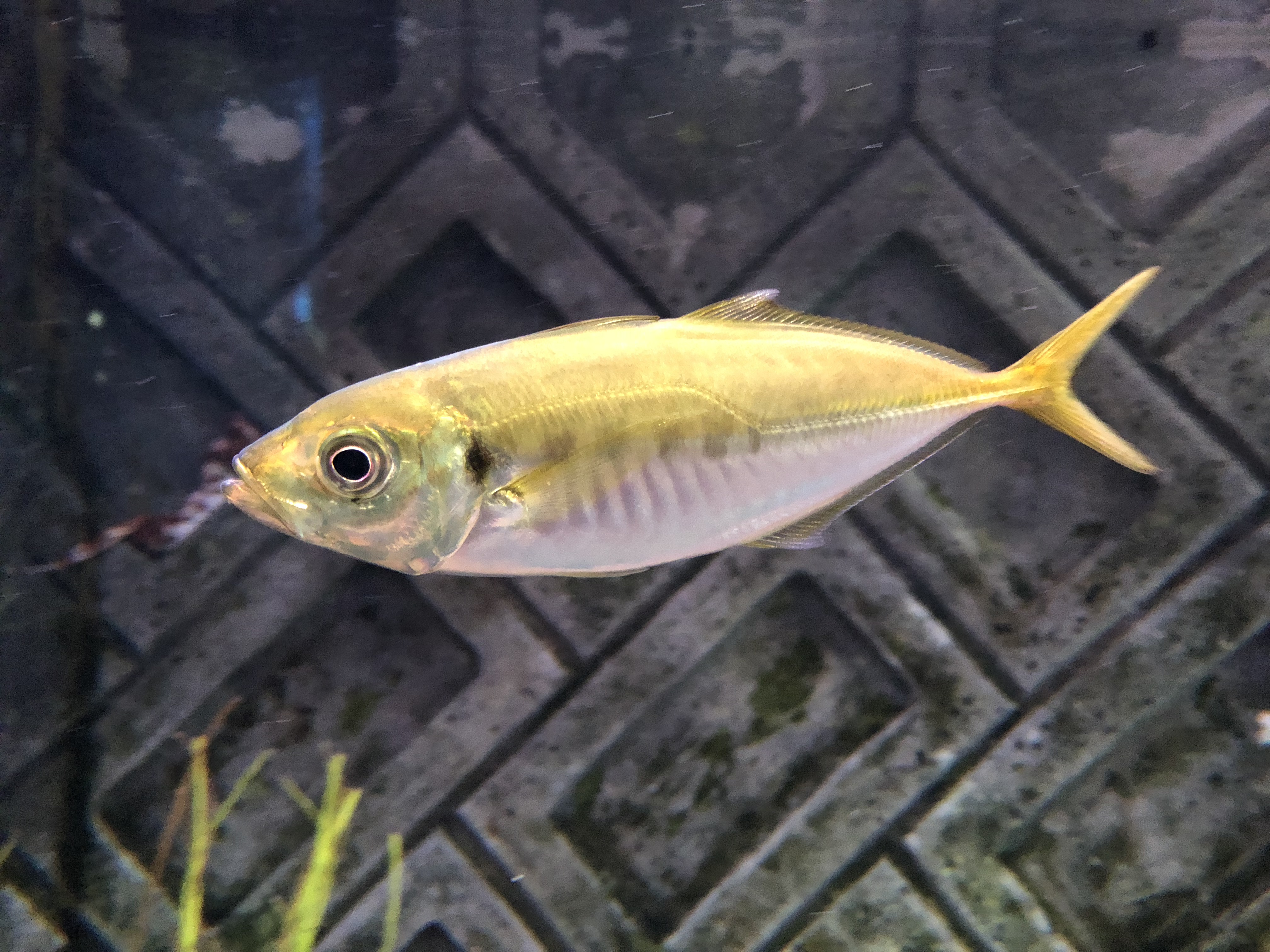 マアジ（大分マリーンパレス水族館飼育個体）